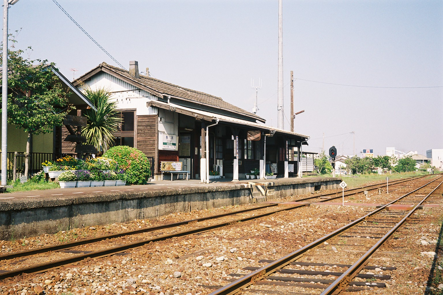 天竜浜名湖線桜木駅構内